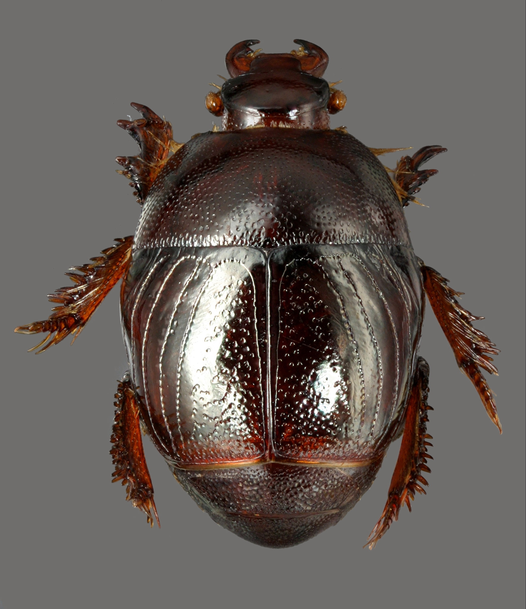 Habitus en vision dorsale de Xenonychus tridens (Jacquelin du Val, 1852) Taille réelle 2,5 mm.